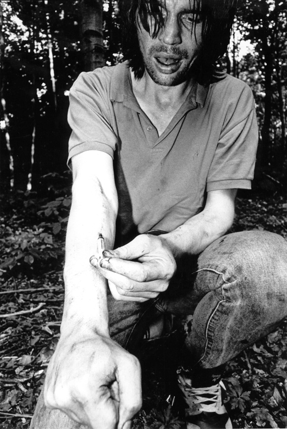 Fixer setzt sich einen Schuß; wurde als Anhalter mitgenommen